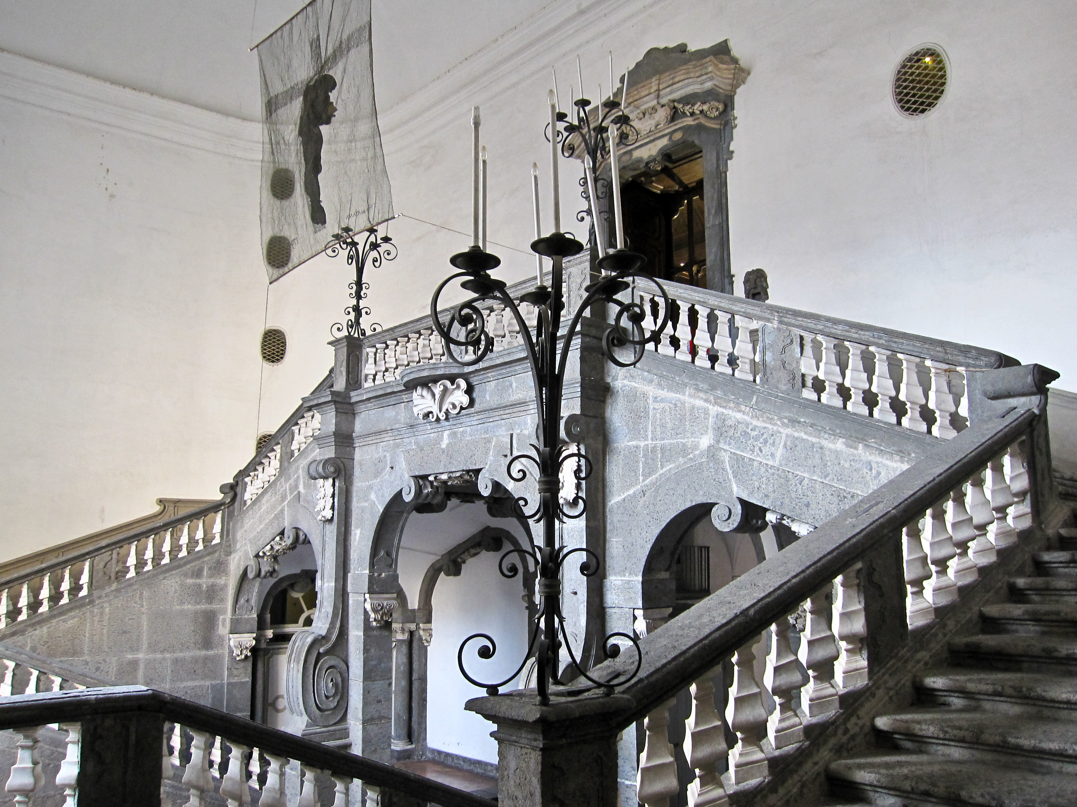 Lo scalone del Sanfelice in piperno e marmo. Palazzo Serra di Cassano - Napoli.